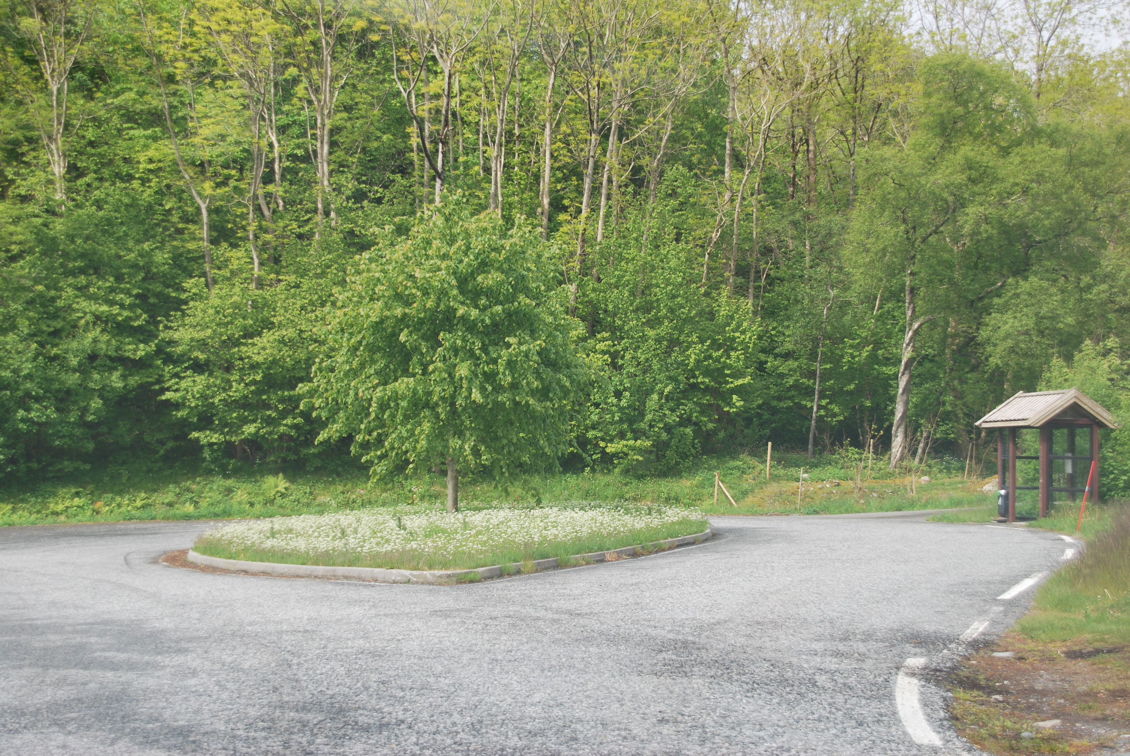 Endepunkt på Tyssøy. Fylkesvei 207.